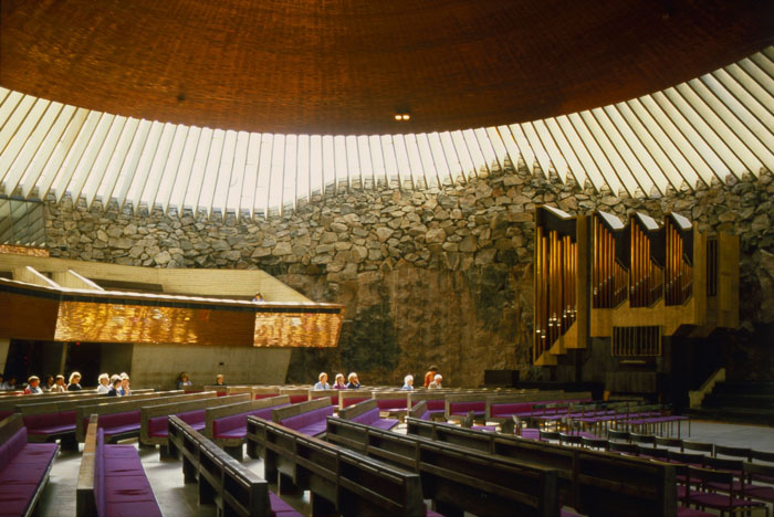 Temppeliaukion kirkko, Helsinki, Finland. Osa lehtriä ja urut